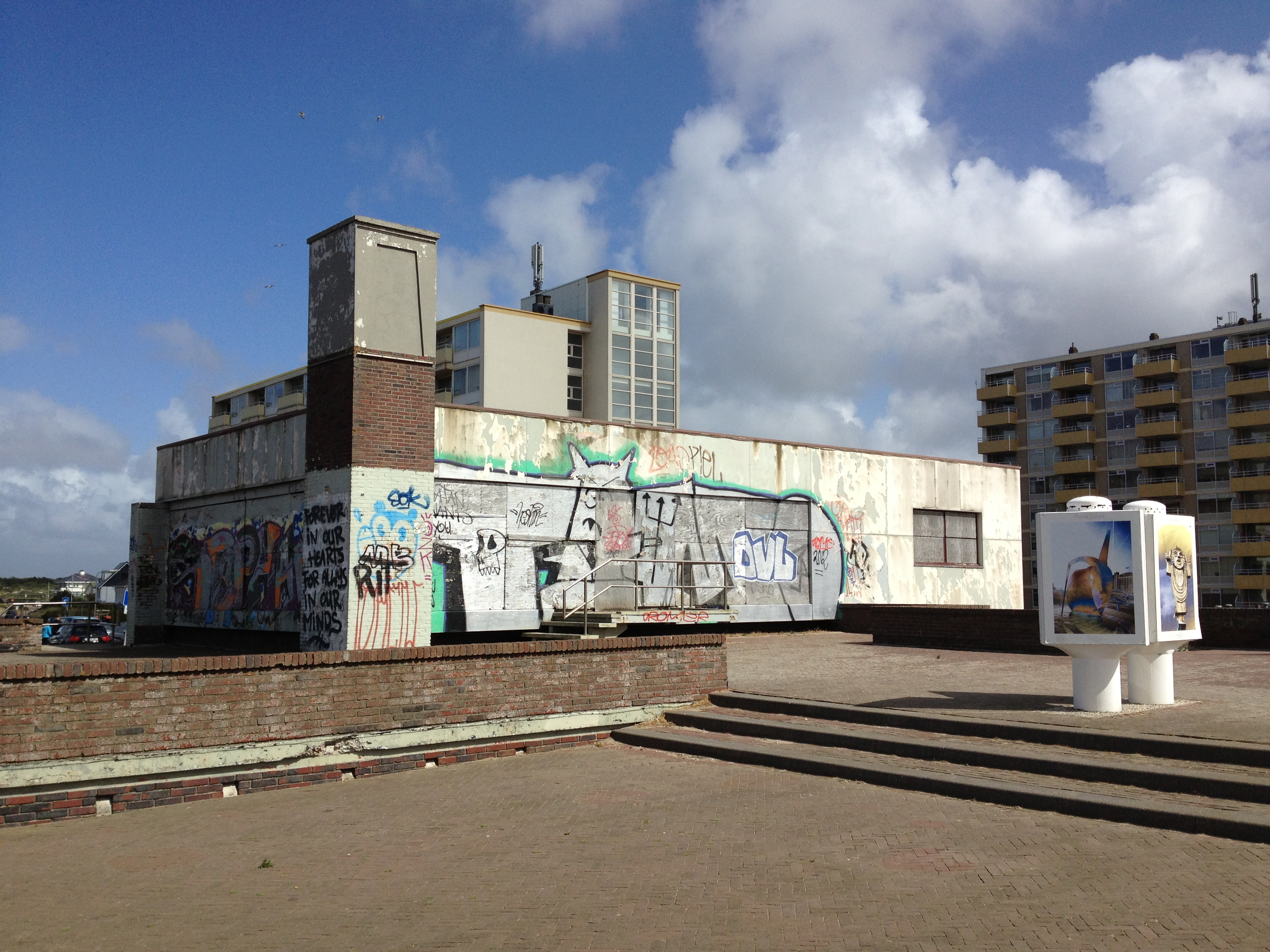 restaurant De Vuurtoren, Noordwijk, South Holland